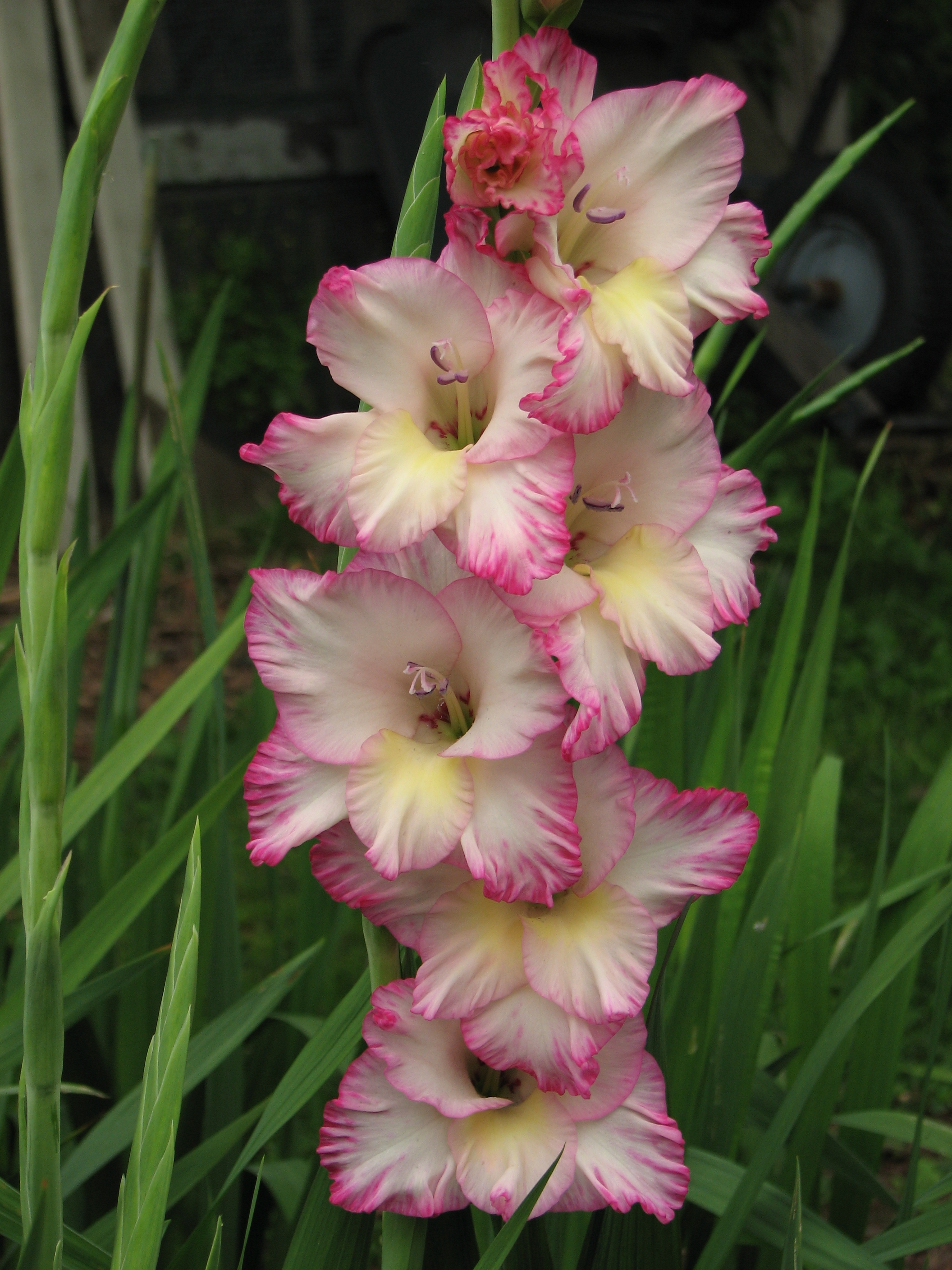 The gladiolus cultivar "Priscilla".